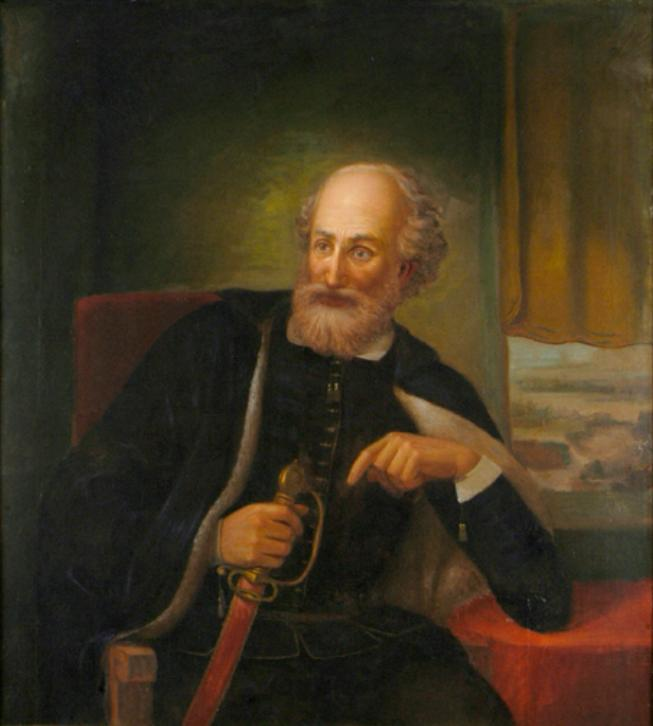 Retrato de Rodrigo de Quiroga, Governor of Chile 1565-1567, 1575-1580 La Colecciòn de Retratos de los Presidentes del Coloniaje. The collection of Portraits of the Governors of Chile is in the Museo Histórico Nacional (Chile) and was commissioned by Benjamín Vicuña Mackenna for the 1873 Colonial Exhibition and painted by various artists. It replaces a series of portraits of Chile's colonial governors dating from the colonial era which was destroyed during the wars for independence. [1].